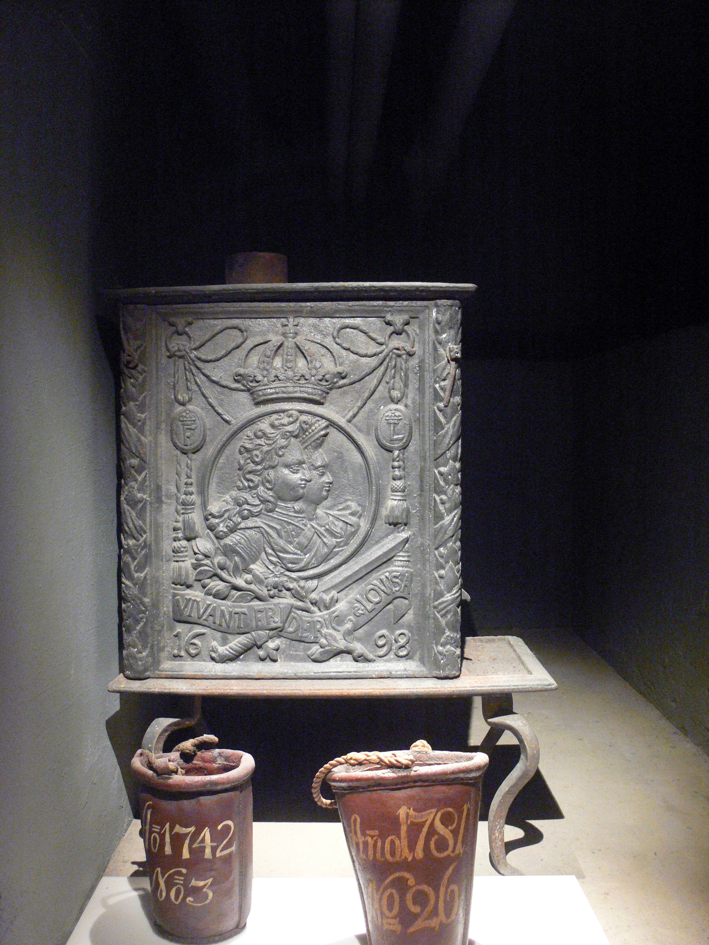 Alter Heizofen aus dem Schloss Christiansborg. Die großen Brände des Schlosses 1794 und 1884 werden auf Kaminbrände aus solchen Öfen zurückgeführt.